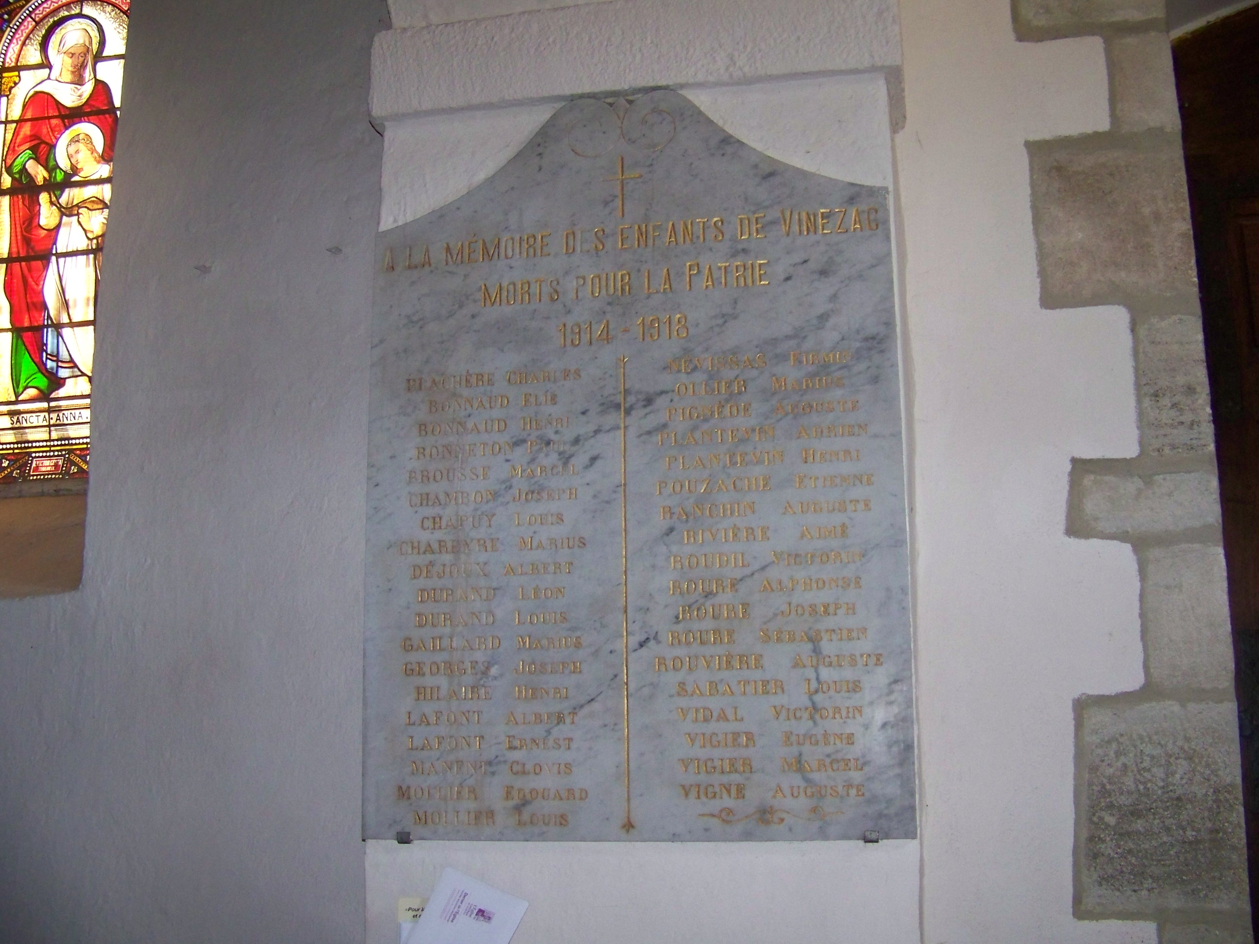 aux morts de la paroisse.